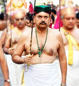 മൂലം തിരുനാള്‍ രാമ വര്‍മ